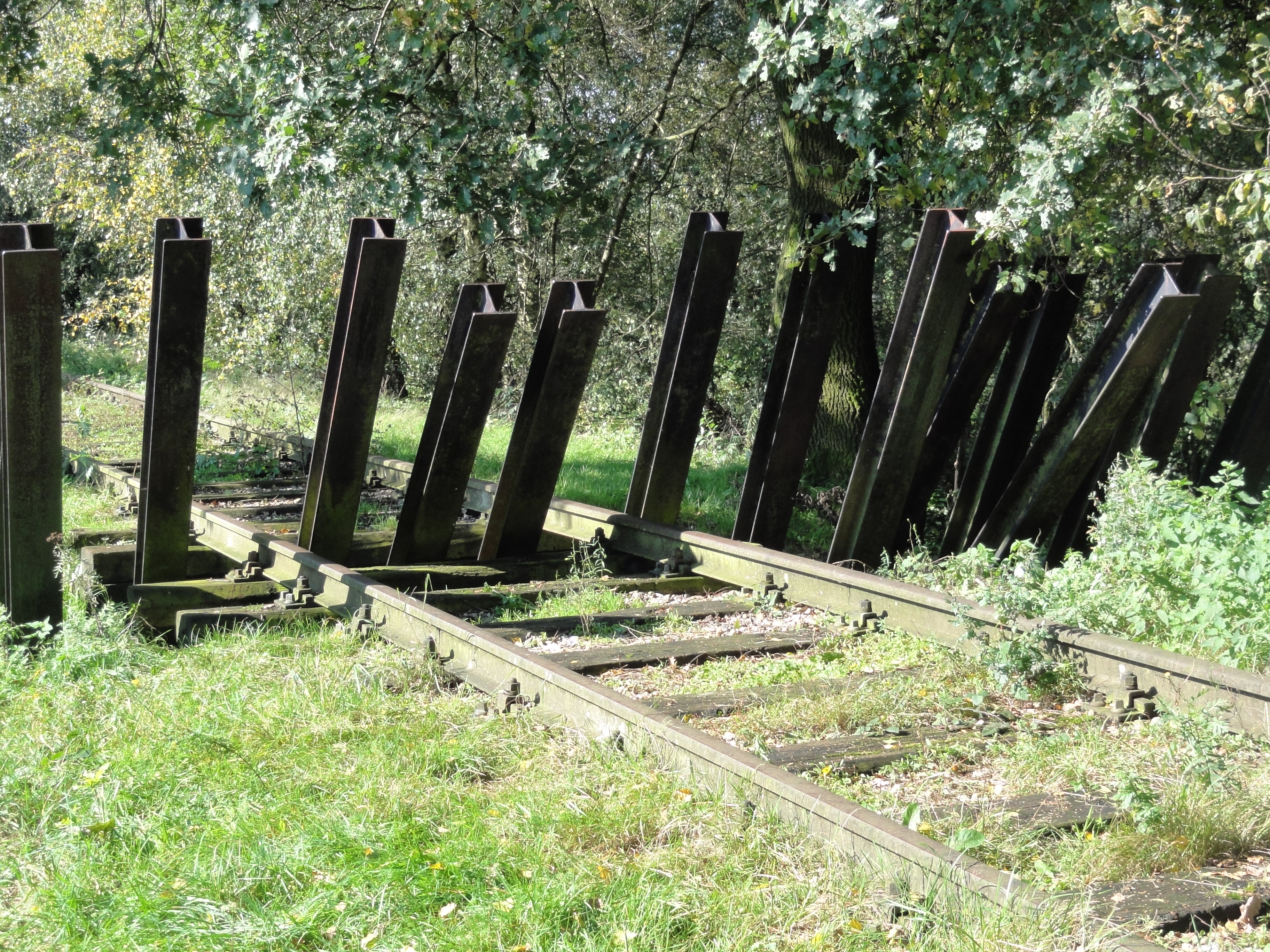 Mill Rijksmonument 509273 aspergeversperring op spoordijk ten oosten van Defensiekanaal. Vlak nadat op 10 mei deze versperring was aangelegd, is er een Duitse trein op ontspoord. 12″ N, 5° 46′ 05.06″ E